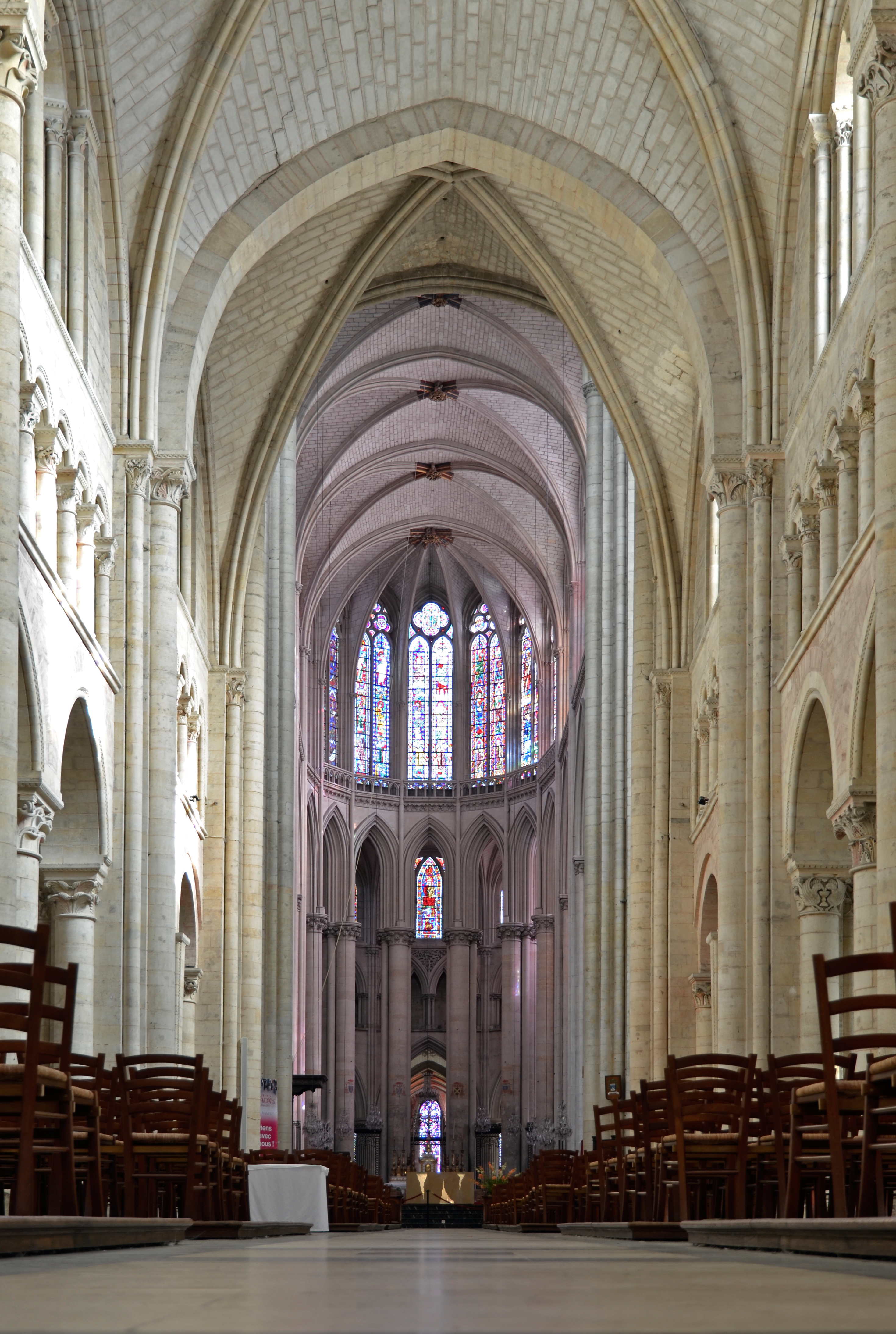 Cathédrale Saint-Julien - Le Mans (Sarthe) .